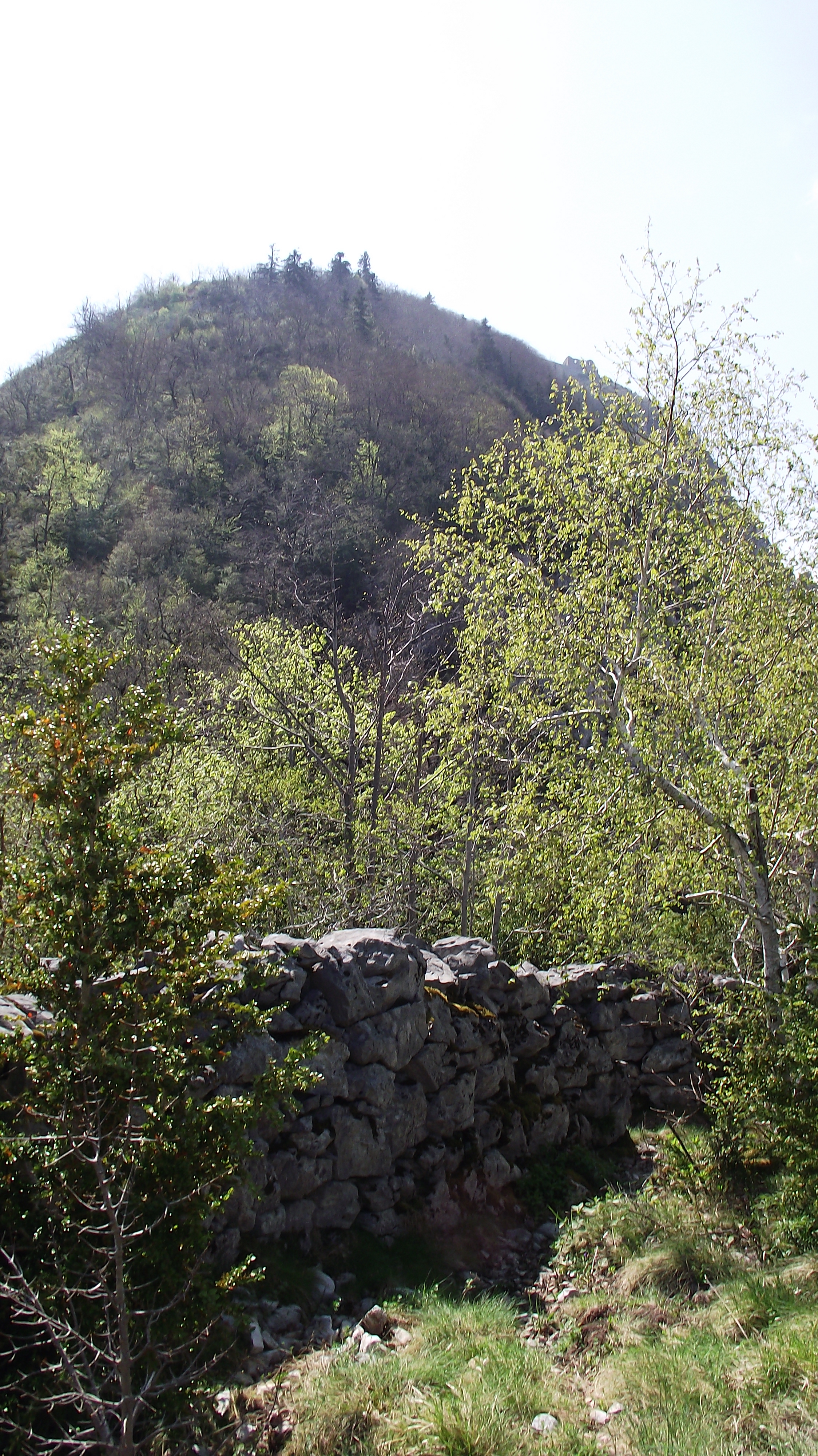 Vestigis de la guàrdia del Roc de la Tor.